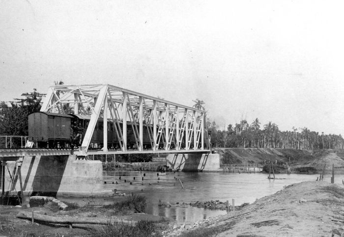 Repronegatief. Een trein rijdt op een spoorbrug over een rivier in LhoSuemawèsche, Blang Mé, Atjeh, Noord-Sumatra